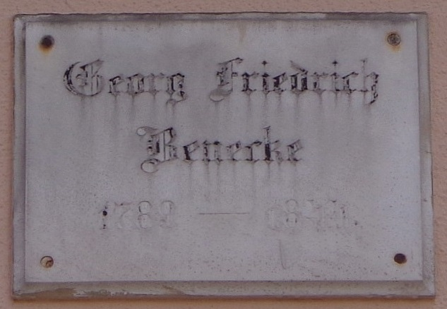 "Göttinger Gedenktafel" für Georg Friedrich Benecke, Germanist (Groner-Tor-Straße 16)